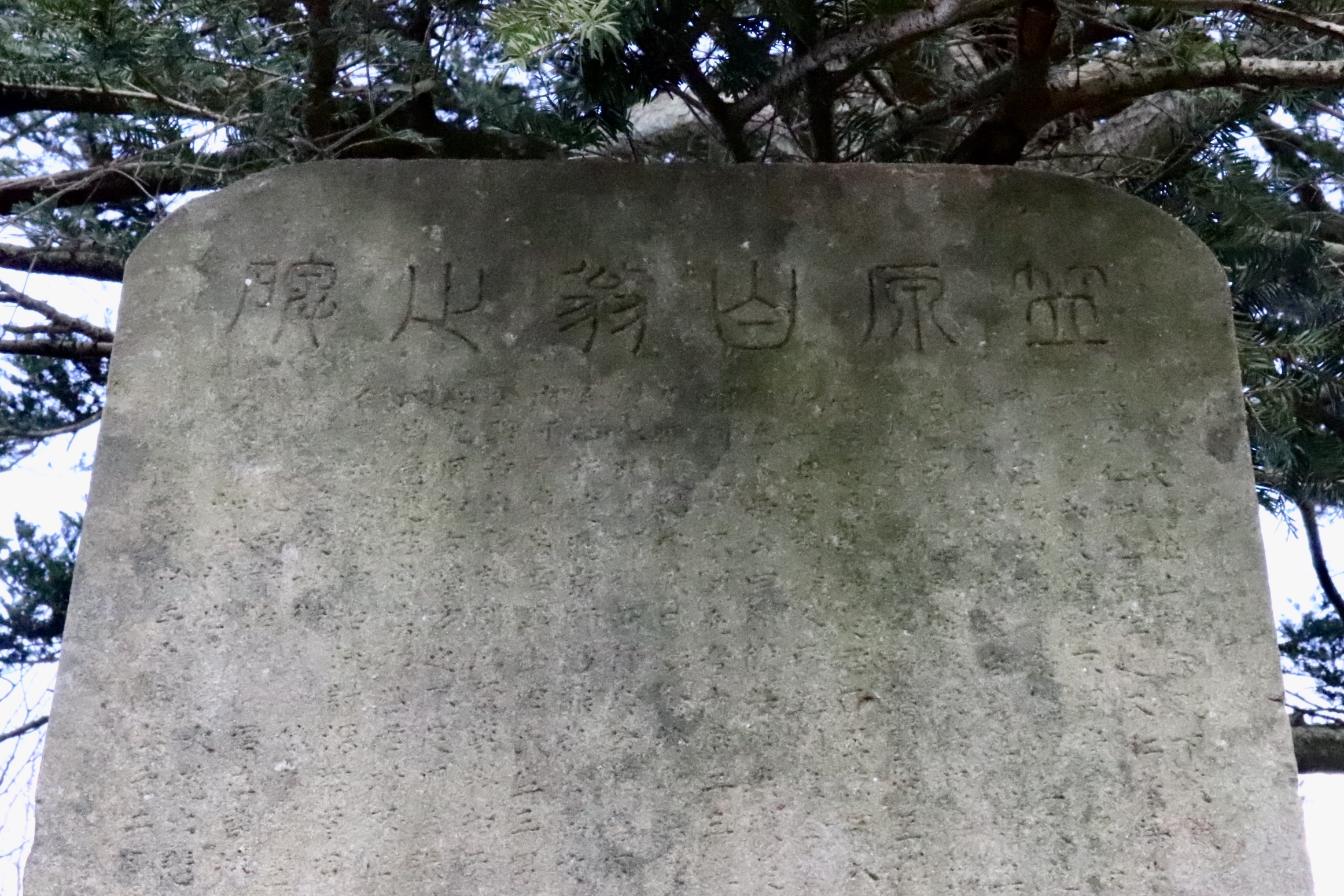 篆額は山階宮。碑文は川田剛。福井市自然史博物館横の通称「三段広場」にある。明治27年8月門人たちが建立。主唱者は大武又玄、水野行敏、安藤精軒。